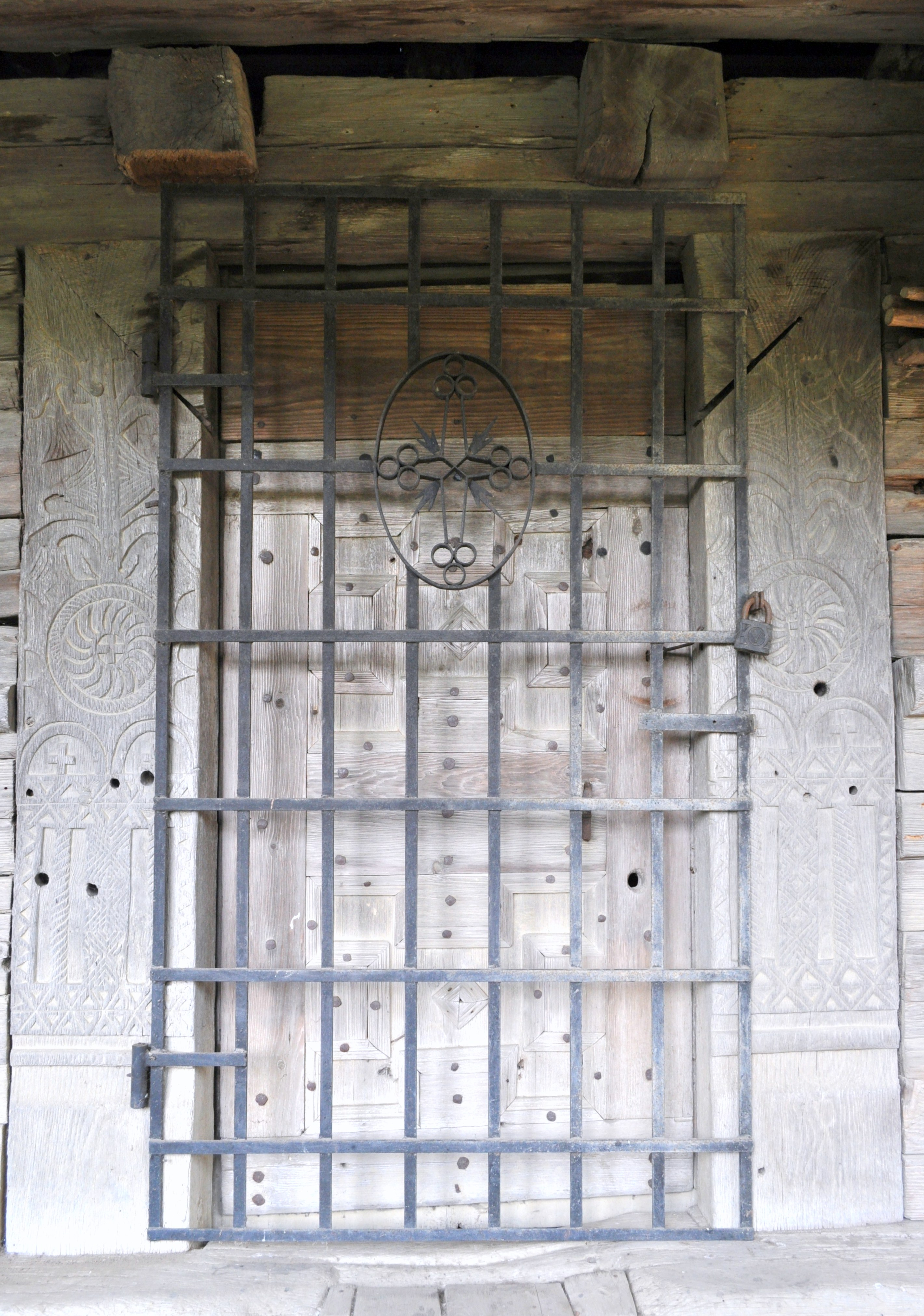 Biserica de lemn „Sfinții Arhangheli” din Băița, Mureș